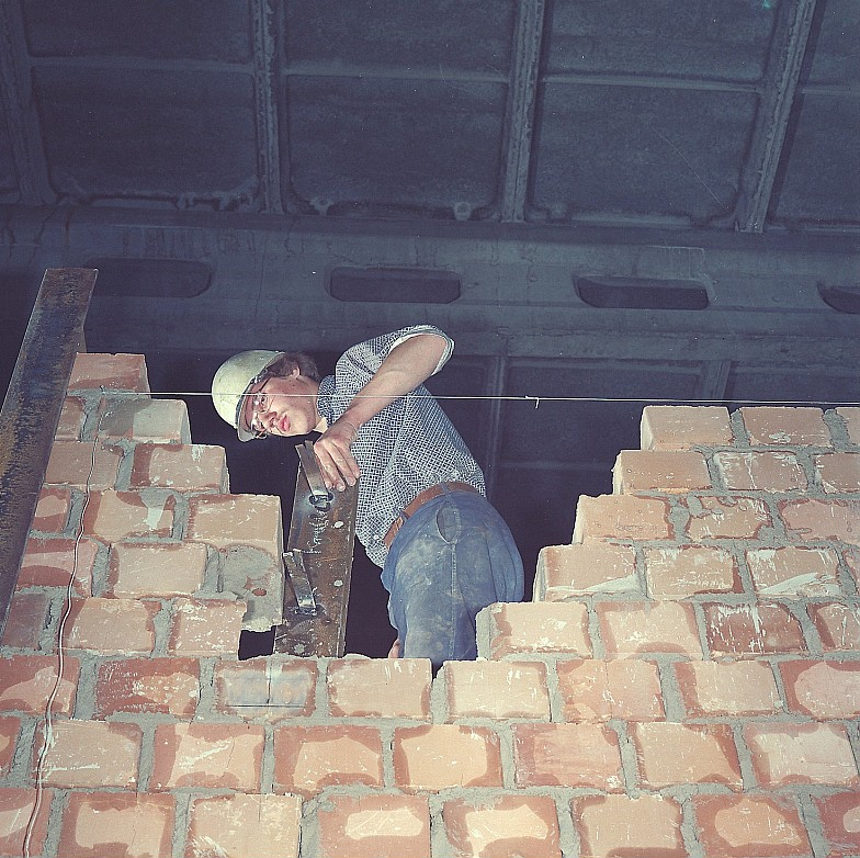 Original image description from the Deutsche Fotothek Maurer, Brauerei